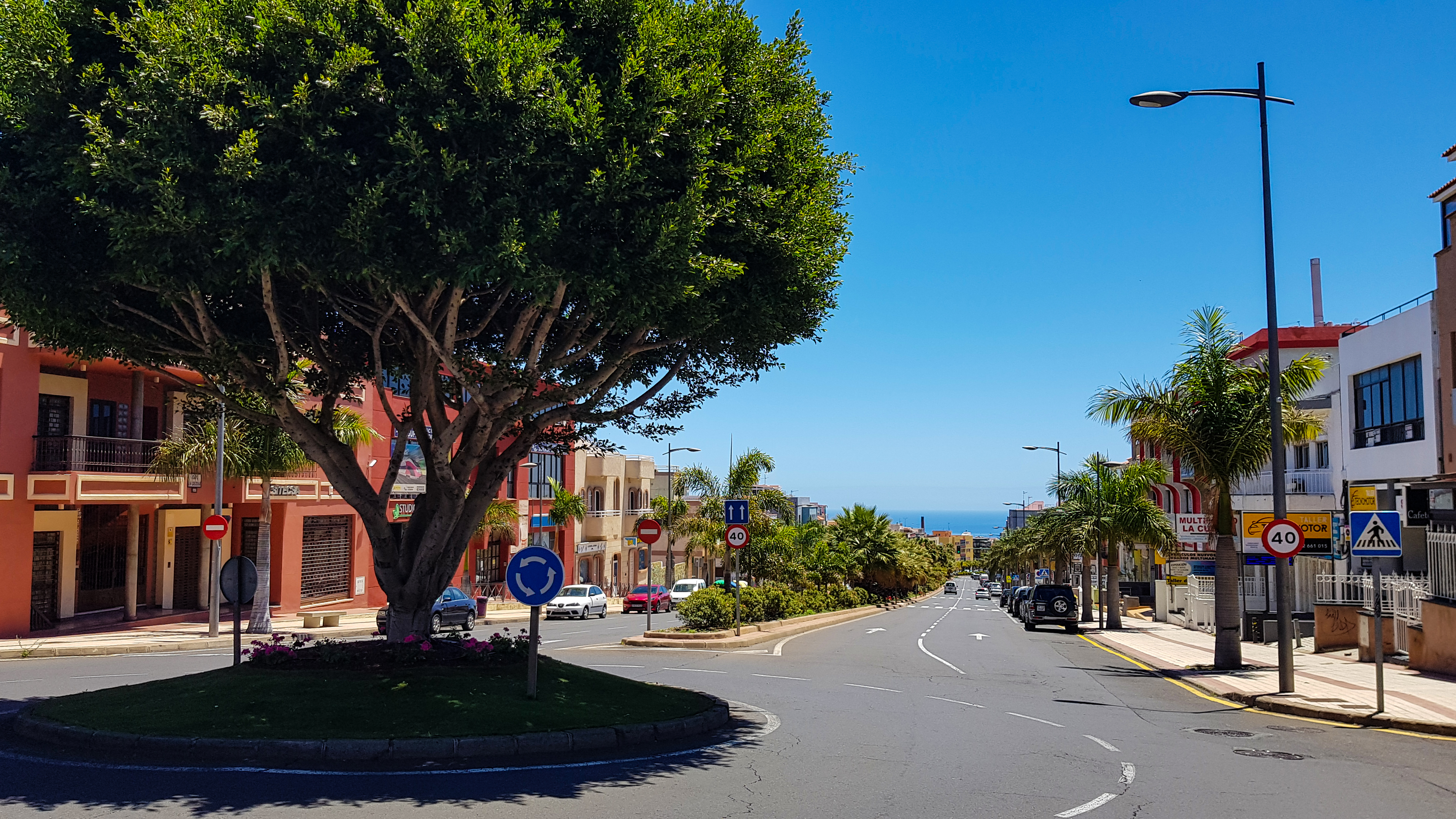 La Cuesta de Arguijón, San Cristobal de La Laguna